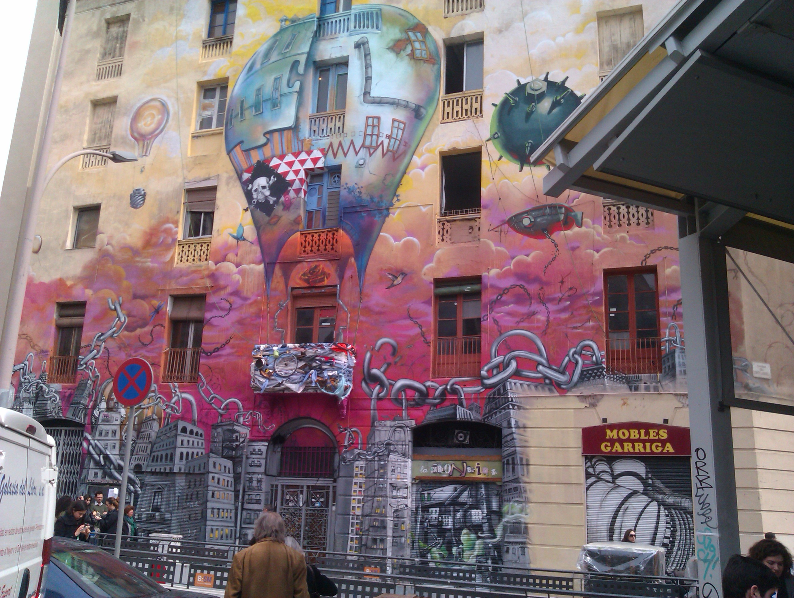 Façana del Centre Social Ocupat Autogestionat (CSOA) La Carboneria al Carrer Urgell de Barcelona. Març 2013